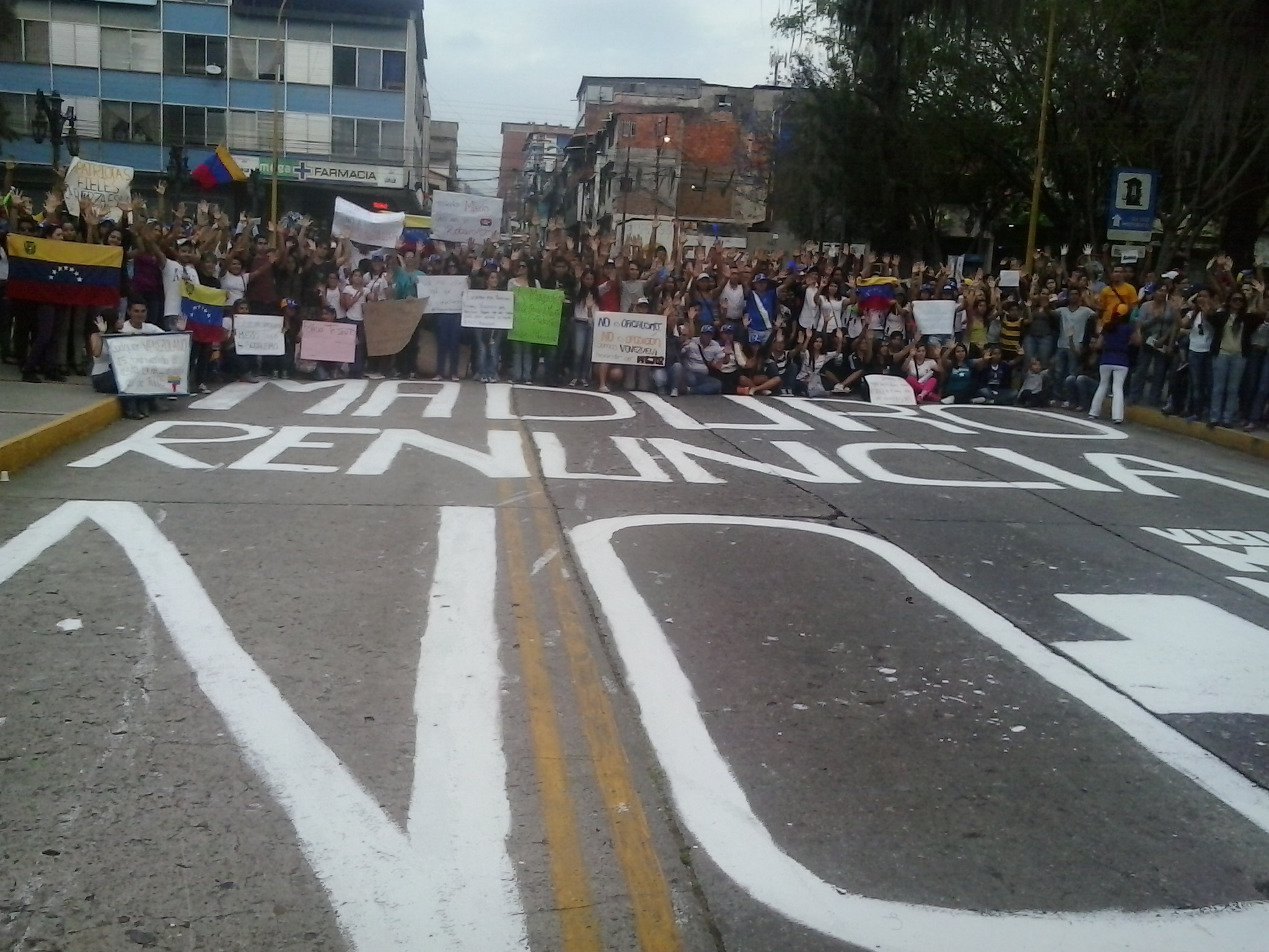 Movilización Estudiantil Pacifica